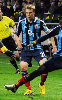 Djurgårdens IF Player Simon Tibbling.